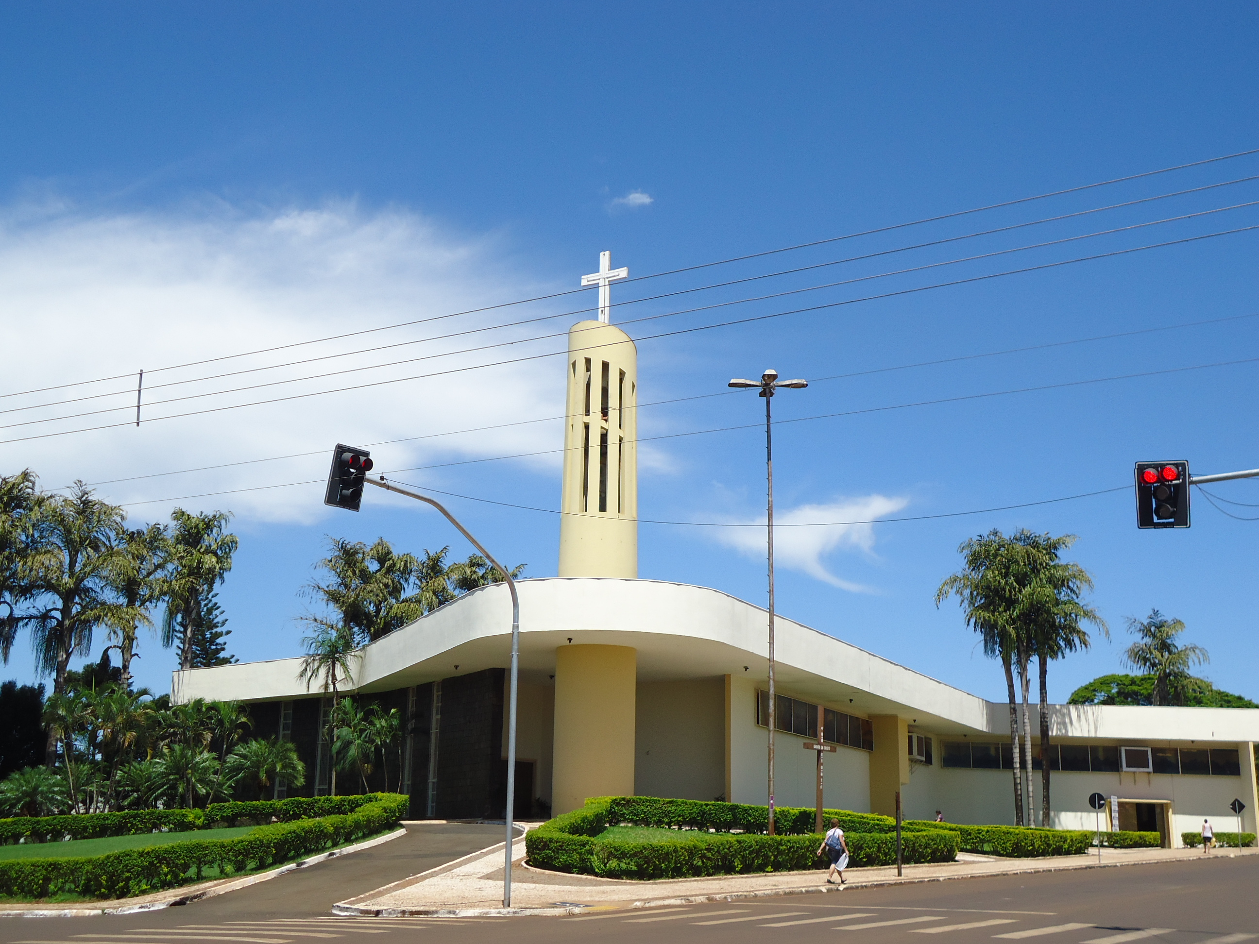 Fotografia da Igreja Matriz de Medianeira, no Paraná.